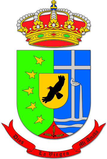 El municipio palmero de Puntallana luce un escudo partido. Primero, de sinople, cinco estrellas de oro, alargadas en su punta externa y siniestradas en arco. Segundo, de azur, cruz de plata resaltada de concha de lo mismo, vertiendo agua de los mismo, todo sobre ondas de plata y azur. Entado en punta, de gules, tres espigas de oro. Sobre el todo, escusón de oro con una graja volando al natural. Al timbre, corona real cerrada. Bajo la punta, cinta de gules con la leyenda “Dios-La Virgen-Mi Amada” en letras de sable. Las cinco estrellas simbolizan los cinco barrios del municipio, y con su disposición y forma figuran rayos de sol surgiendo desde el Este, posición geográfica que ocupa Puntallana en la isla de La Palma. La cruz y la concha son símbolos de San Juan Bautista, patrón del pueblo, y el agua que vierte la concha alude a los numerosos manantiales que existen en el territorio, mientras que las ondas simbolizan la insularidad. Las espigas de trigo hacen referencia a la importancia que tuvo este cultivo en el pasado, por lo que se conoció a Puntallana como “el granero de la isla”. La graja, ave emblemática de La Palma, según una leyenda apareció por primera vez en este pueblo y después se extendió al resto de la isla, la única de Canarias en donde anida. El lema alude a la leyenda del “Salto del Enamorado”, según la cual un joven, gritando estas palabras, intentó ganar el corazón de su amada girando sobre su lanza al borde de un precipicio, pero en el último momento se precipitó al vacío.